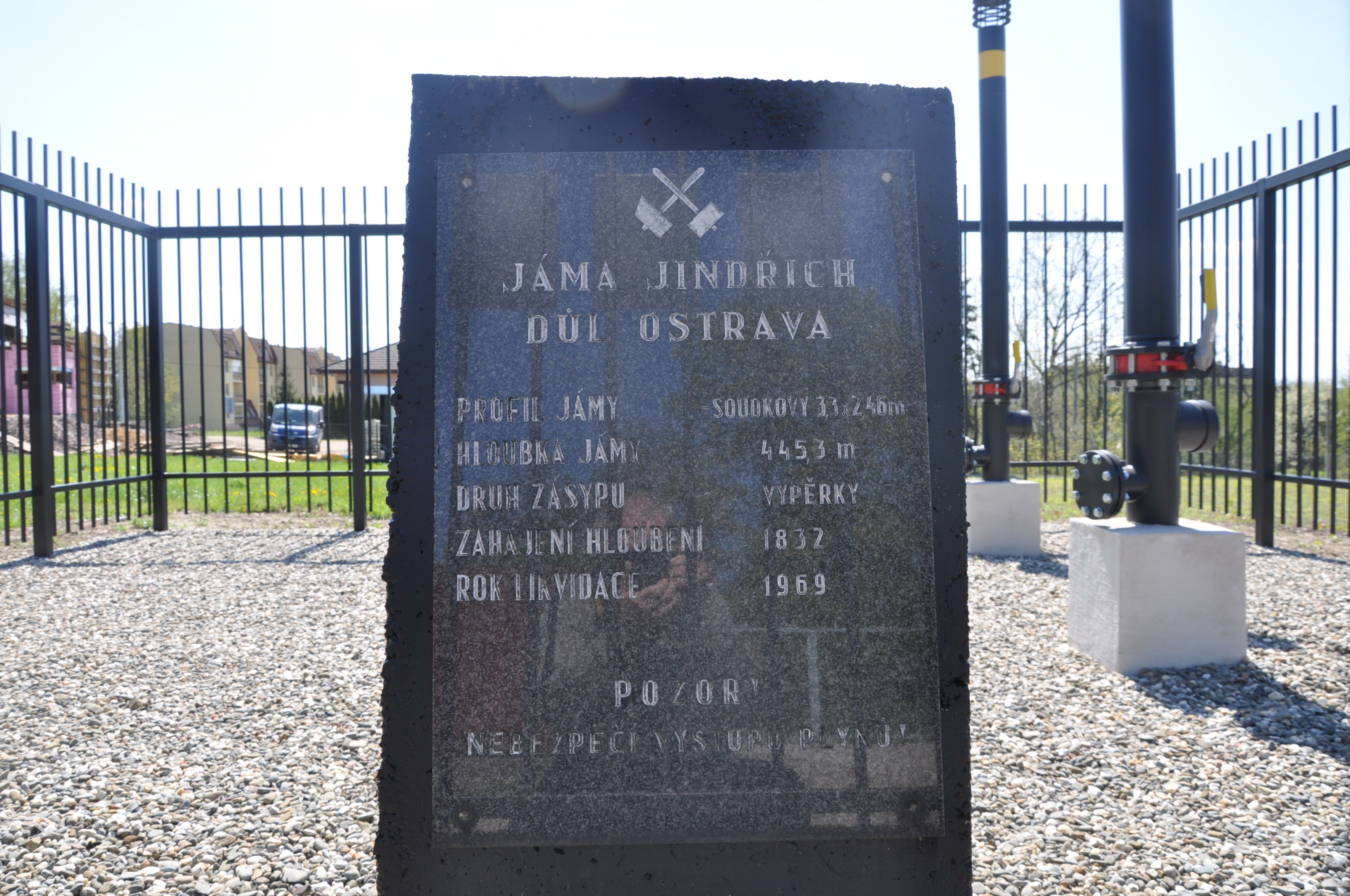 Jáma Jindřich,Slezská Ostrava, informační tabule